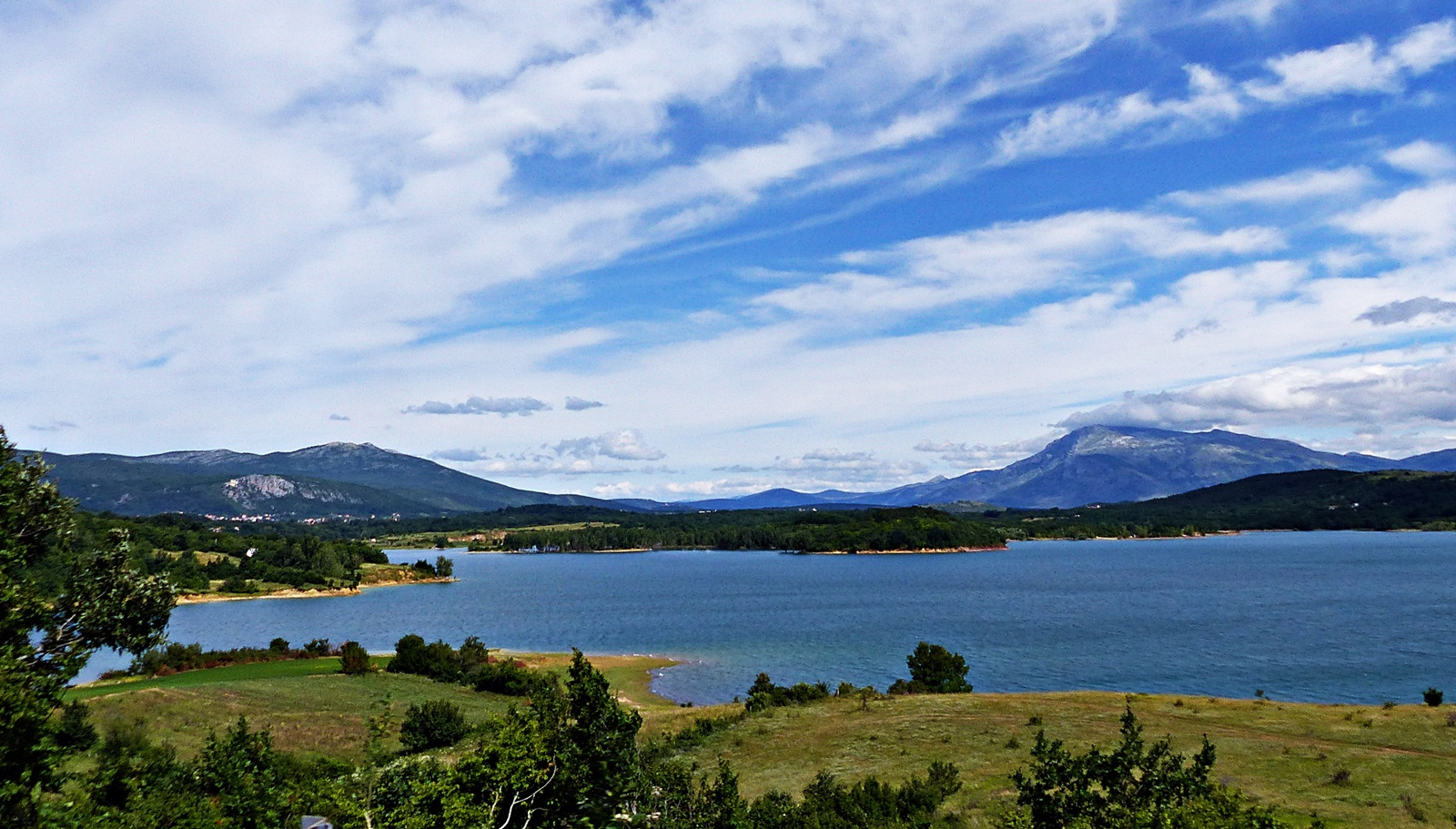 Der Perućko jezero